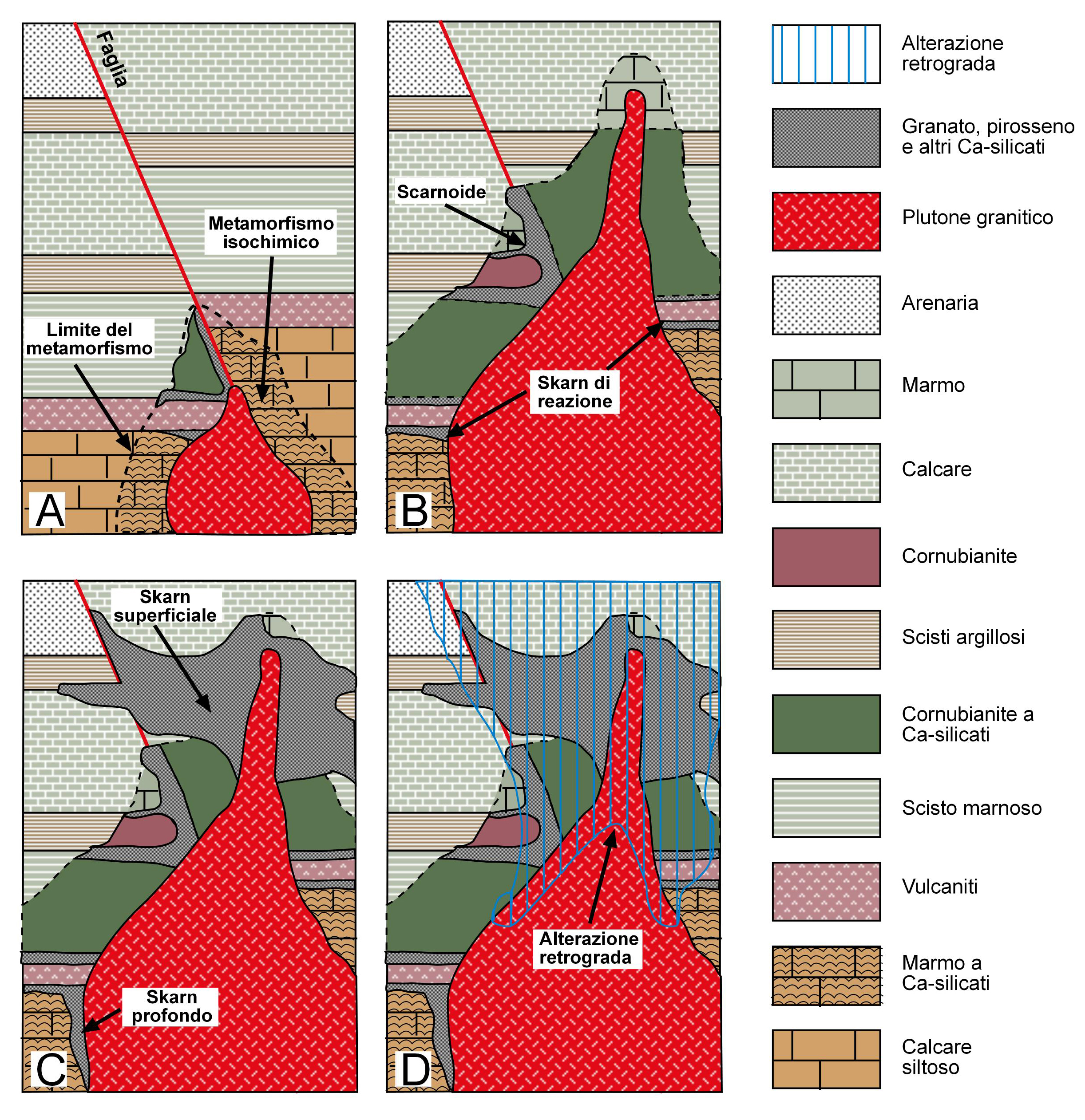 Stadi evolutivi di un deposito di skarn associato a un plutone granitico. Da Meinert, 1992, ridisegnato